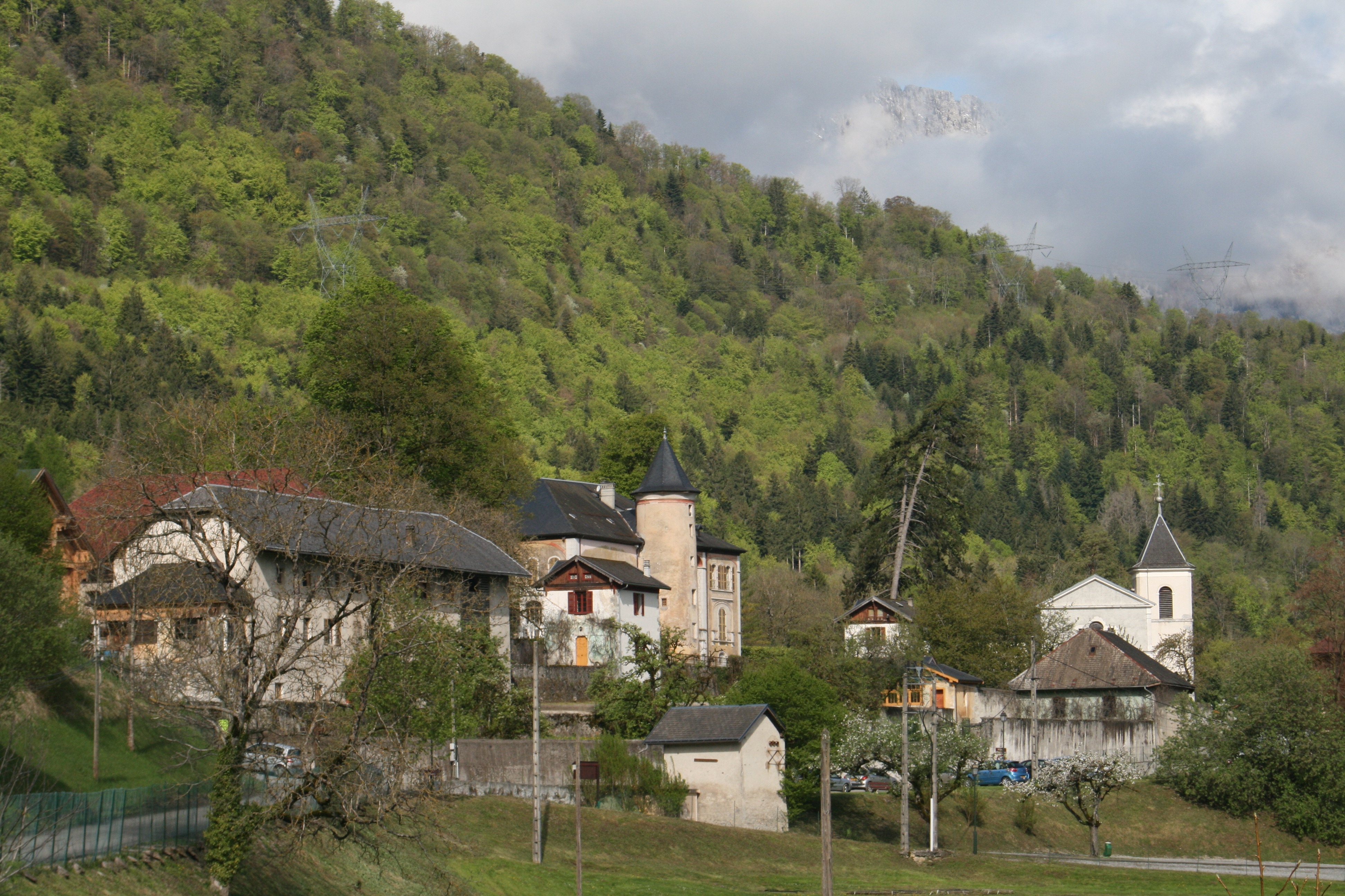 Village de Giez, Ve Gy (Centre)